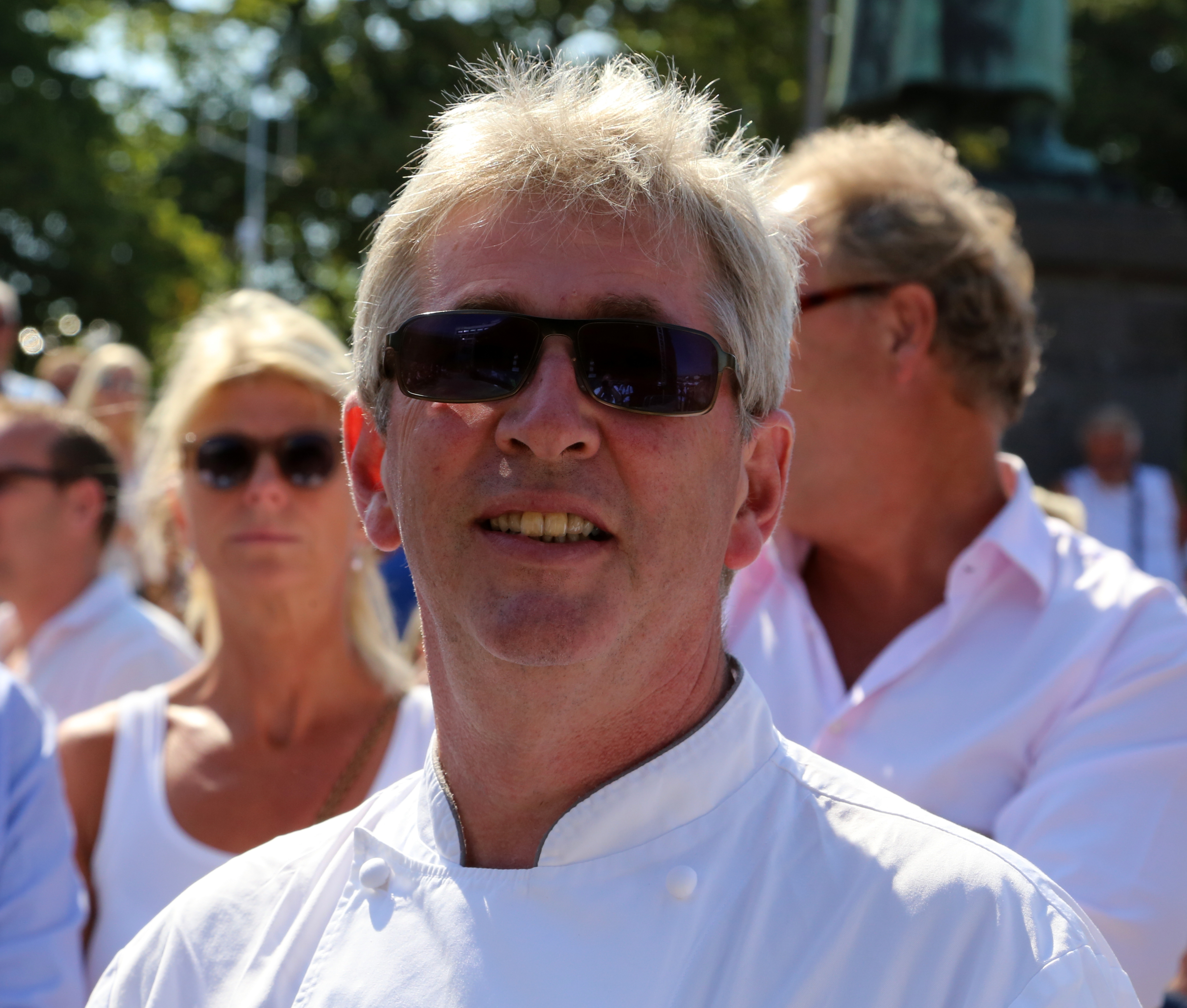 Arne Brimi under Gladmat 2014